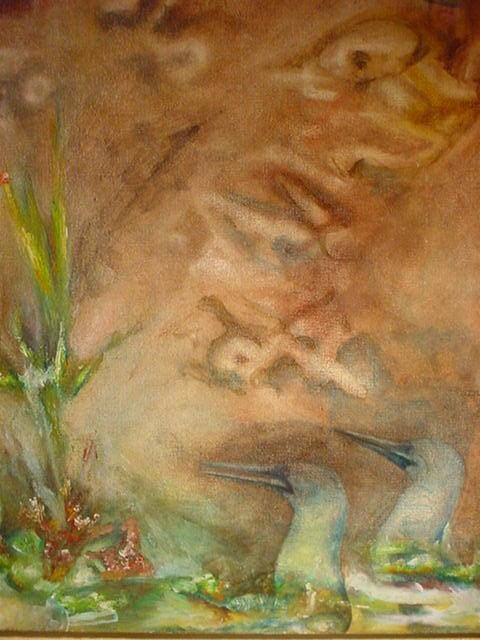 Pintura al oleo